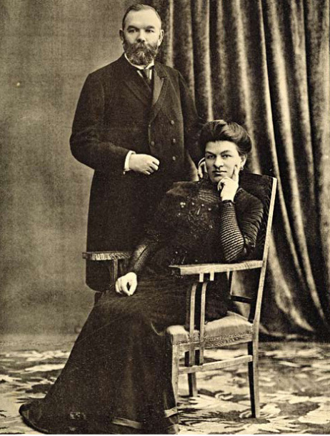 Бардыгин Михаил Никифорович с женой Глафирой Васильевной (урожд. Постниковой.